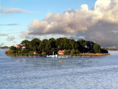 L'île d'Ovide, île où l'on suppose qu'Ovide est mort (les ruines d'une villa romaine s'y trouvent), au nord de Constanta (Roumanie). Son nom est Insula Ovidiu.